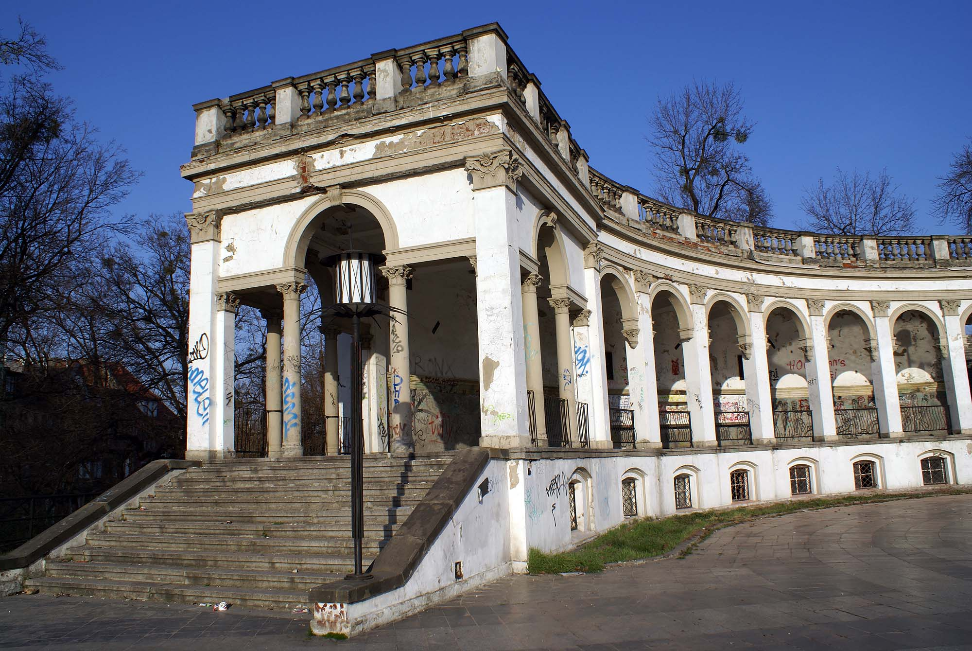 Wrocław, Bastion Sakwowy, tzw. Wzgórze Partyzantów, XIV, XVI, XIX